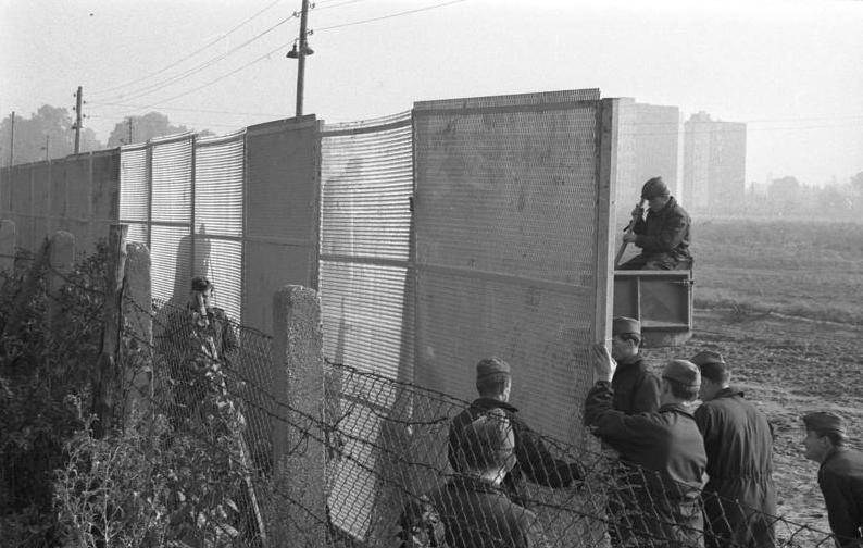 Berlin (Ost) Bau einer "modernen Mauer" an der Zonengrenze bei Kleinmachnow.